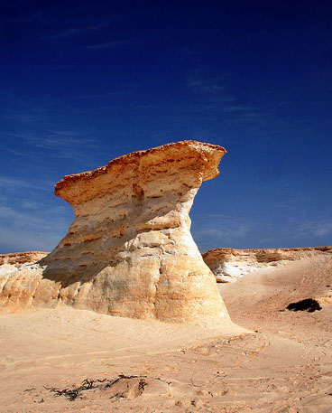 Rock formations, Zikreet.